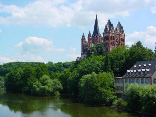 Limburg: Dom/Ansicht über der Lahn von der alten Lahnbrücke aus